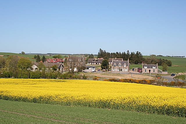 Auchnagatt